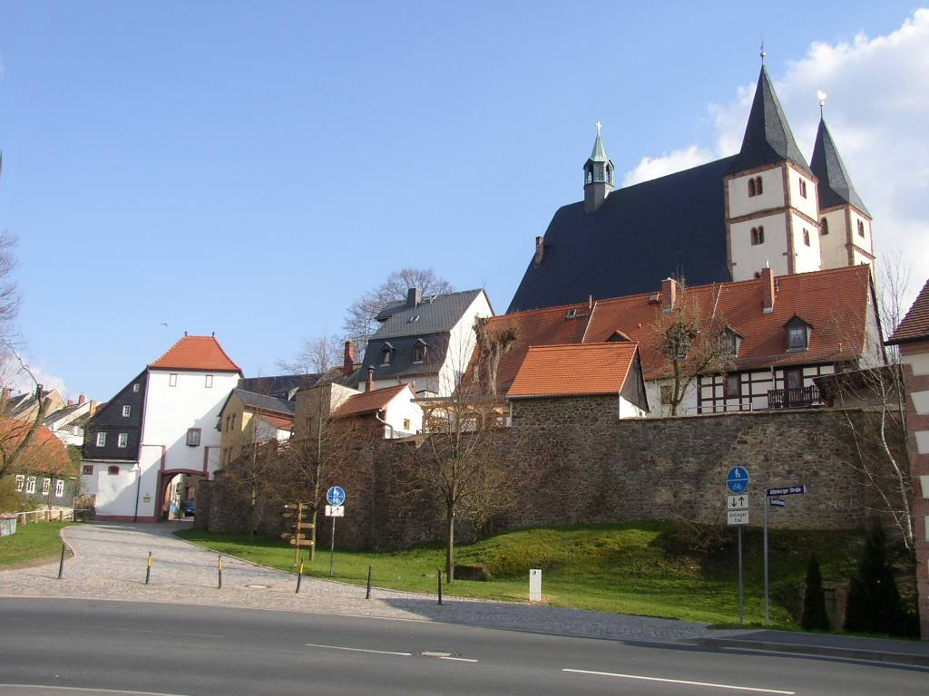 Das untere Stadttor, die Nikolaikirche und die Stadtmauer in Geithain - Teil des Denkmalschutzgebiets Altstadt Geithain.